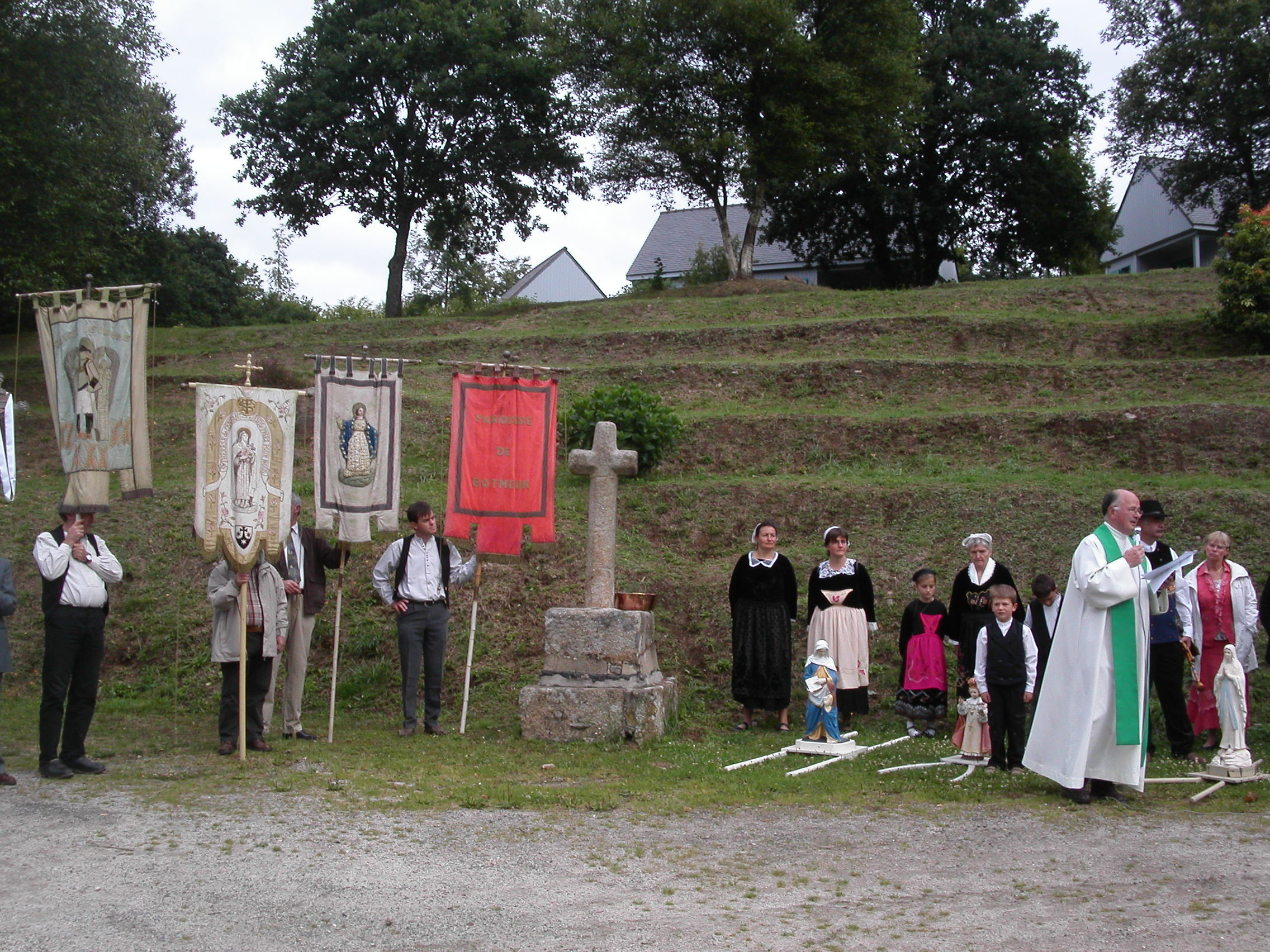 Botmeur: le pardon 2009 près de la croix de mission devant le terrain de camping